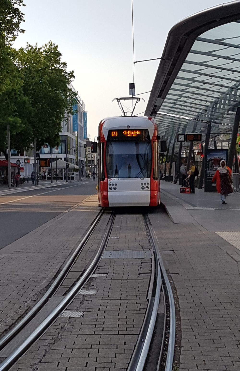 Straßenbahn des Typs 6NGTW, Nummer 564, an der Haltestelle Ostwall in Krefeld mit Glasdach und dem Übergang von Drei- auf Vierschienengleis